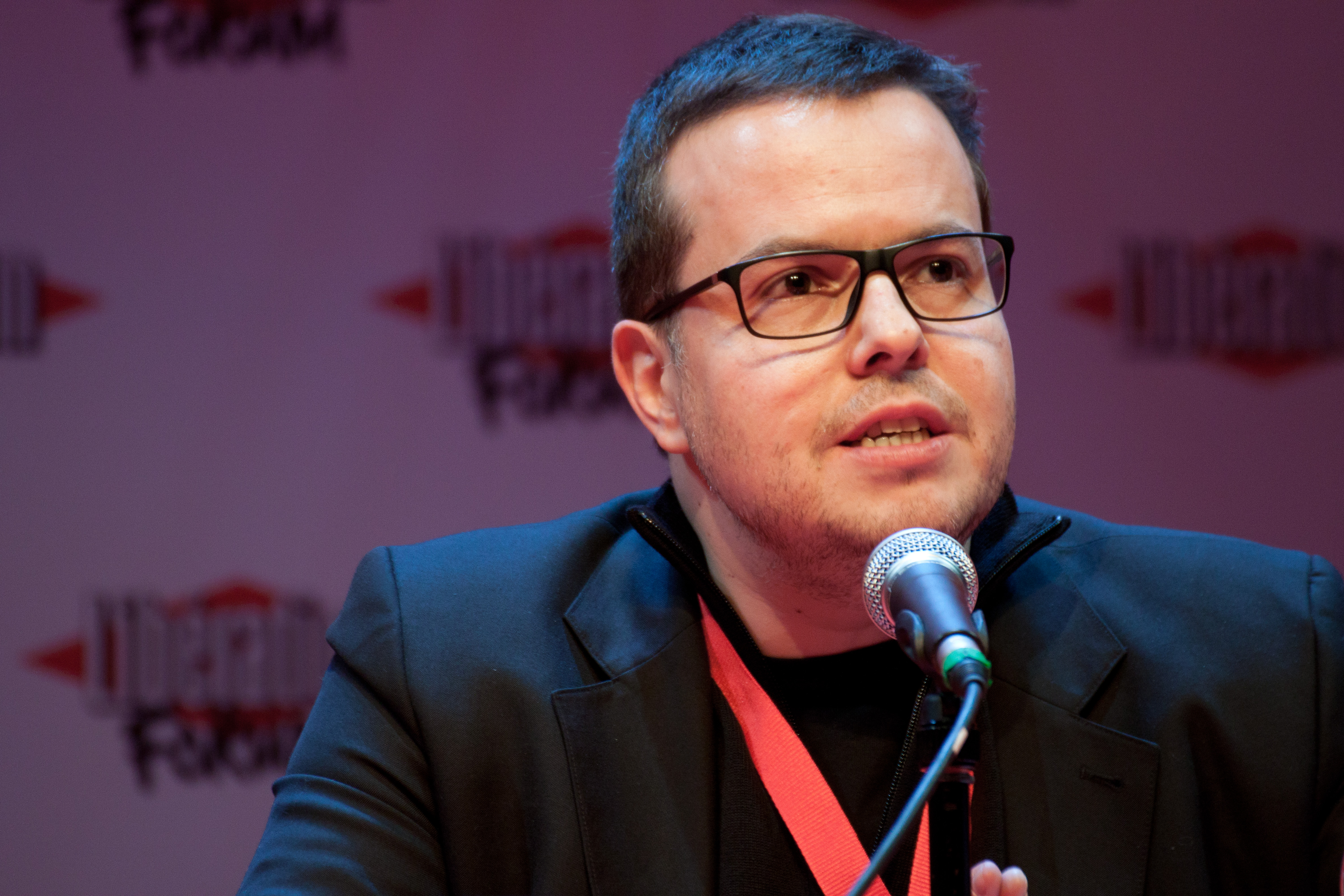 Nicolas Demorand lors du Forum Libération de Grenoble, le 29 janvier 2012